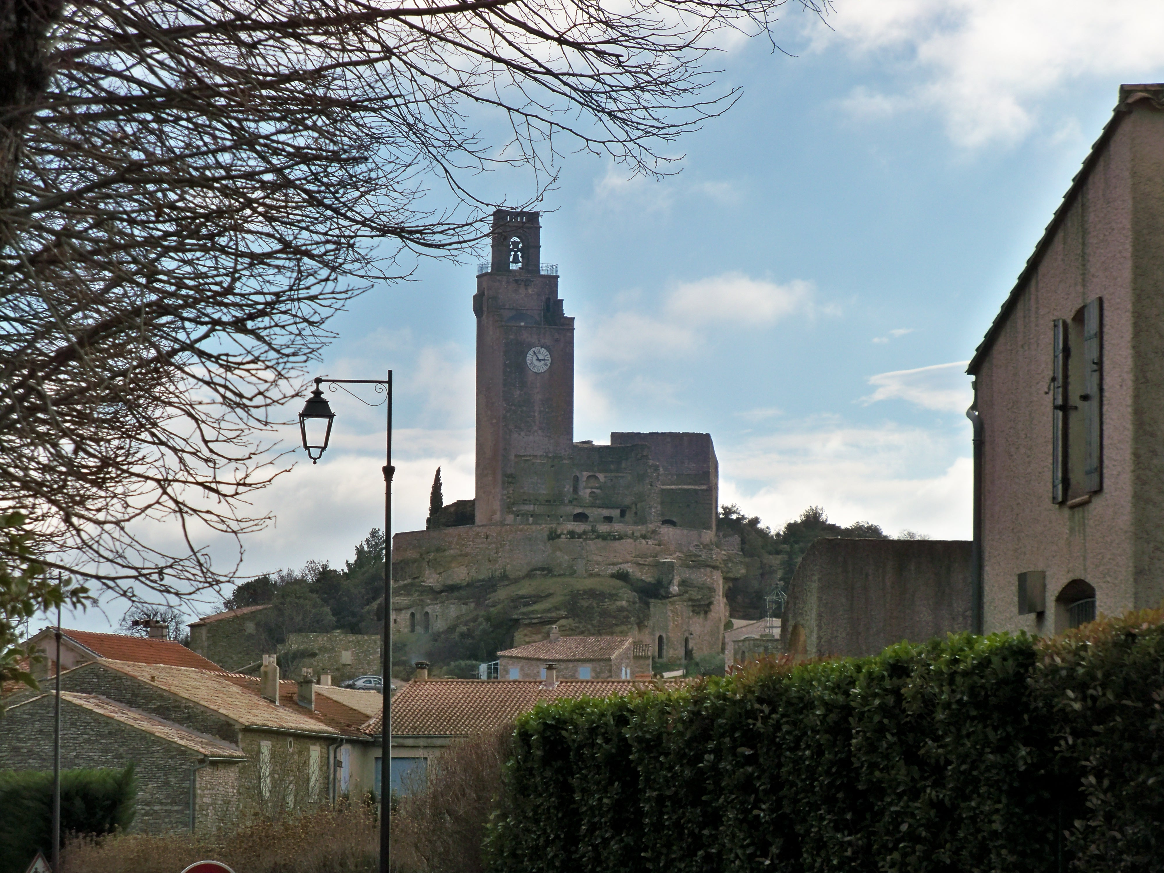 Tour en ruine surplombant le village de Chamaret (26)